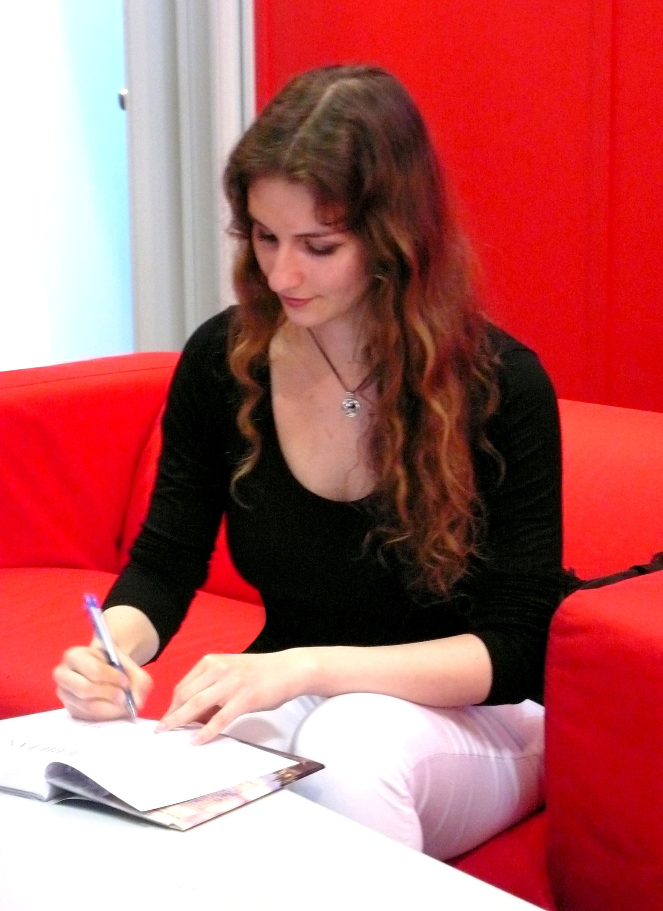 Tereza Janišová